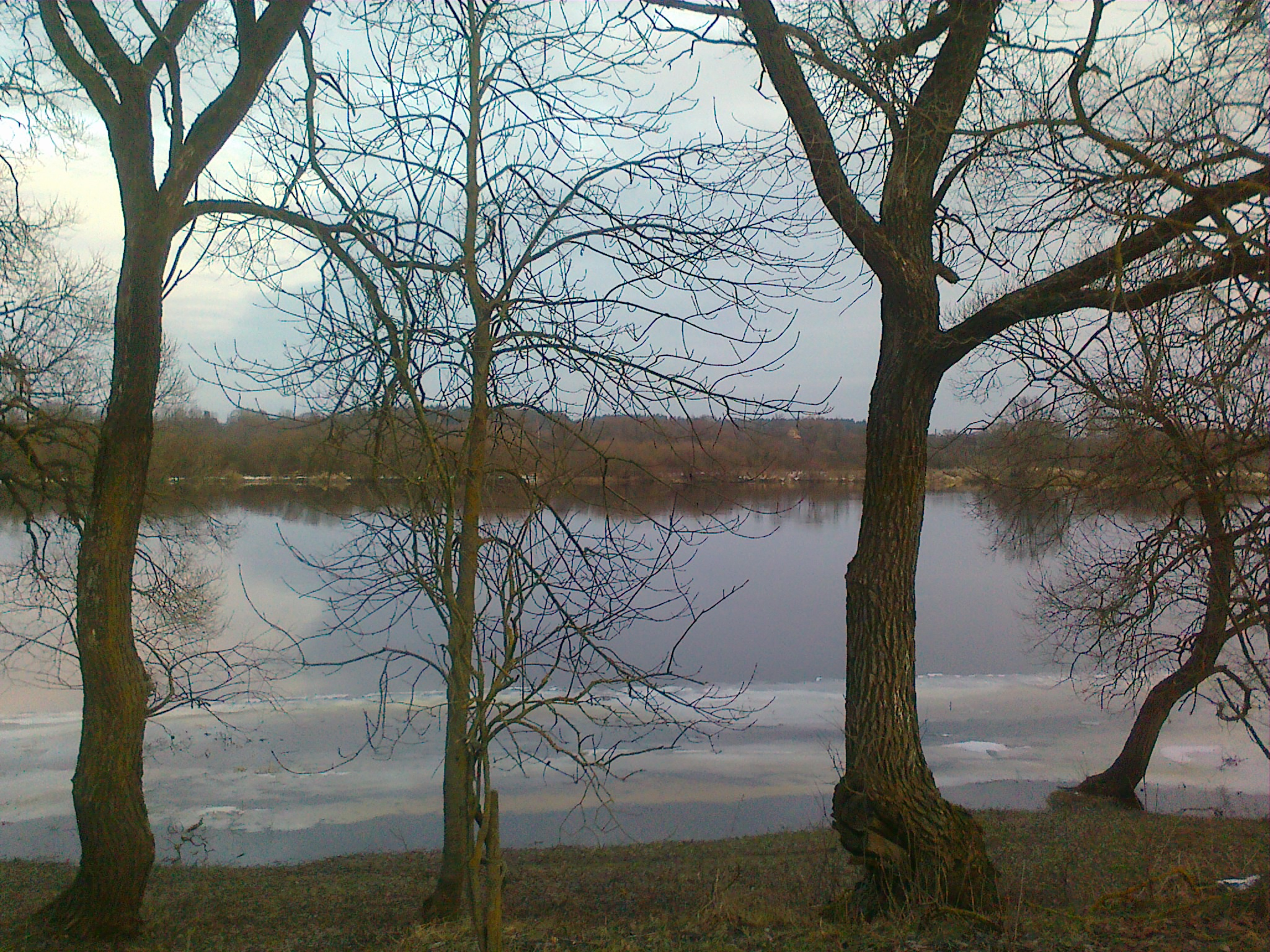 река Березина у деревни Стасевка, Бобруйский район